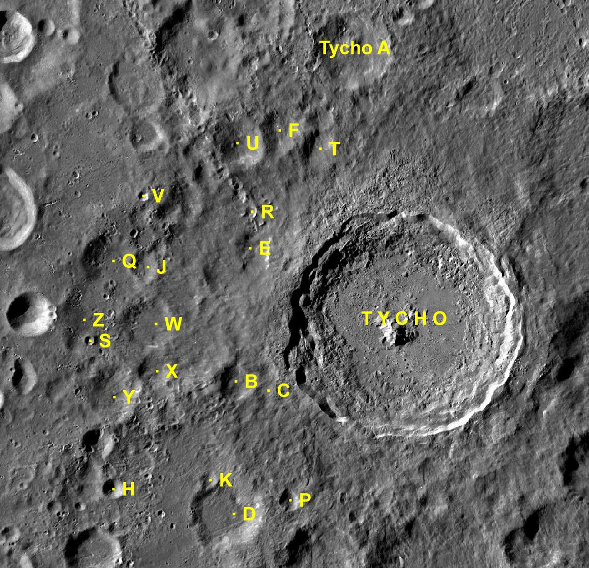 Cráter lunar Tycho. Cráteres satélite. (Imagen LRO)